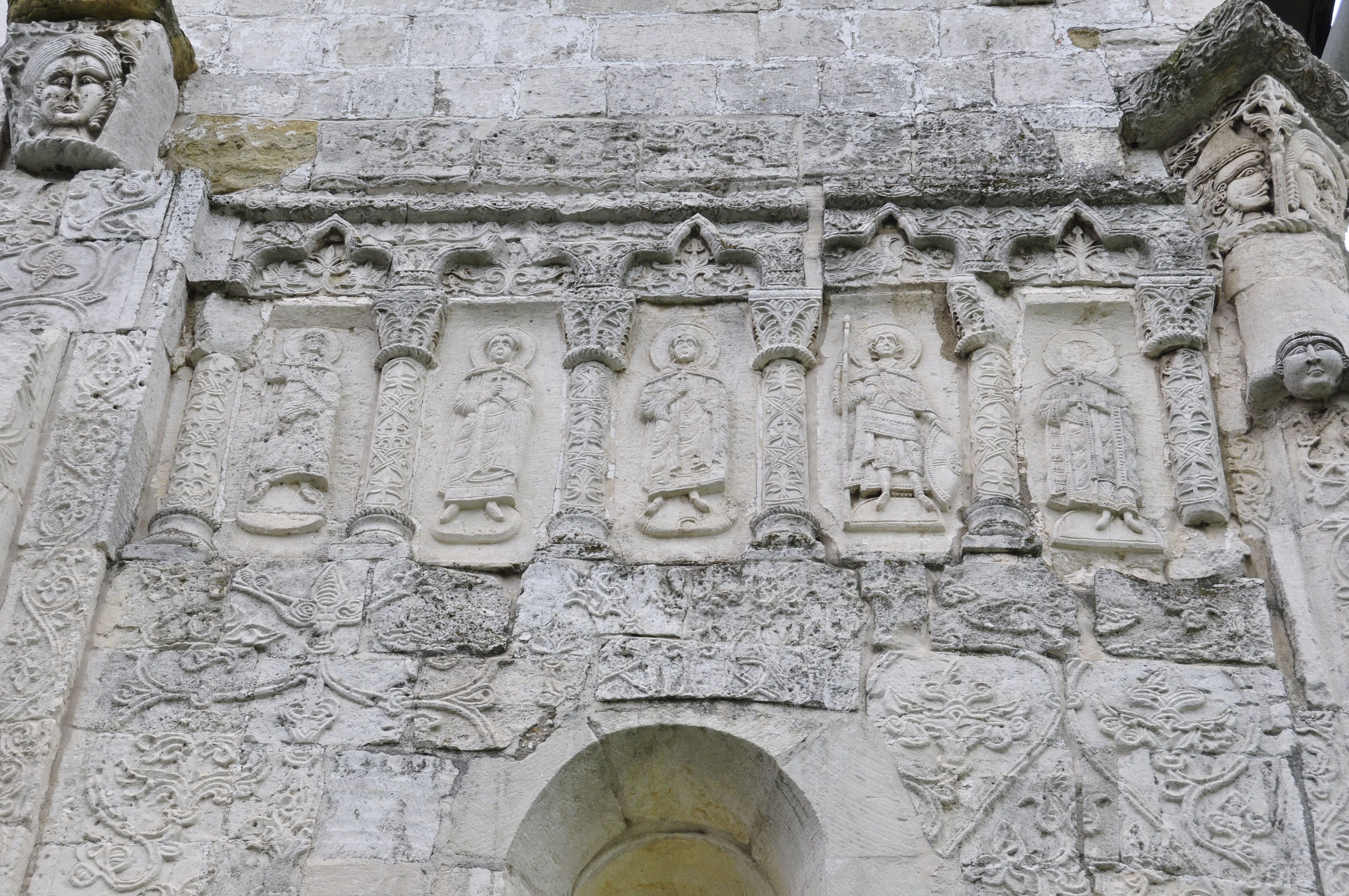 Собор Георгиевский (Георгиевский собор и земляные валы городища): улица 1 Мая, Юрьев-Польский, Юрьев-Польский район, Владимирская область